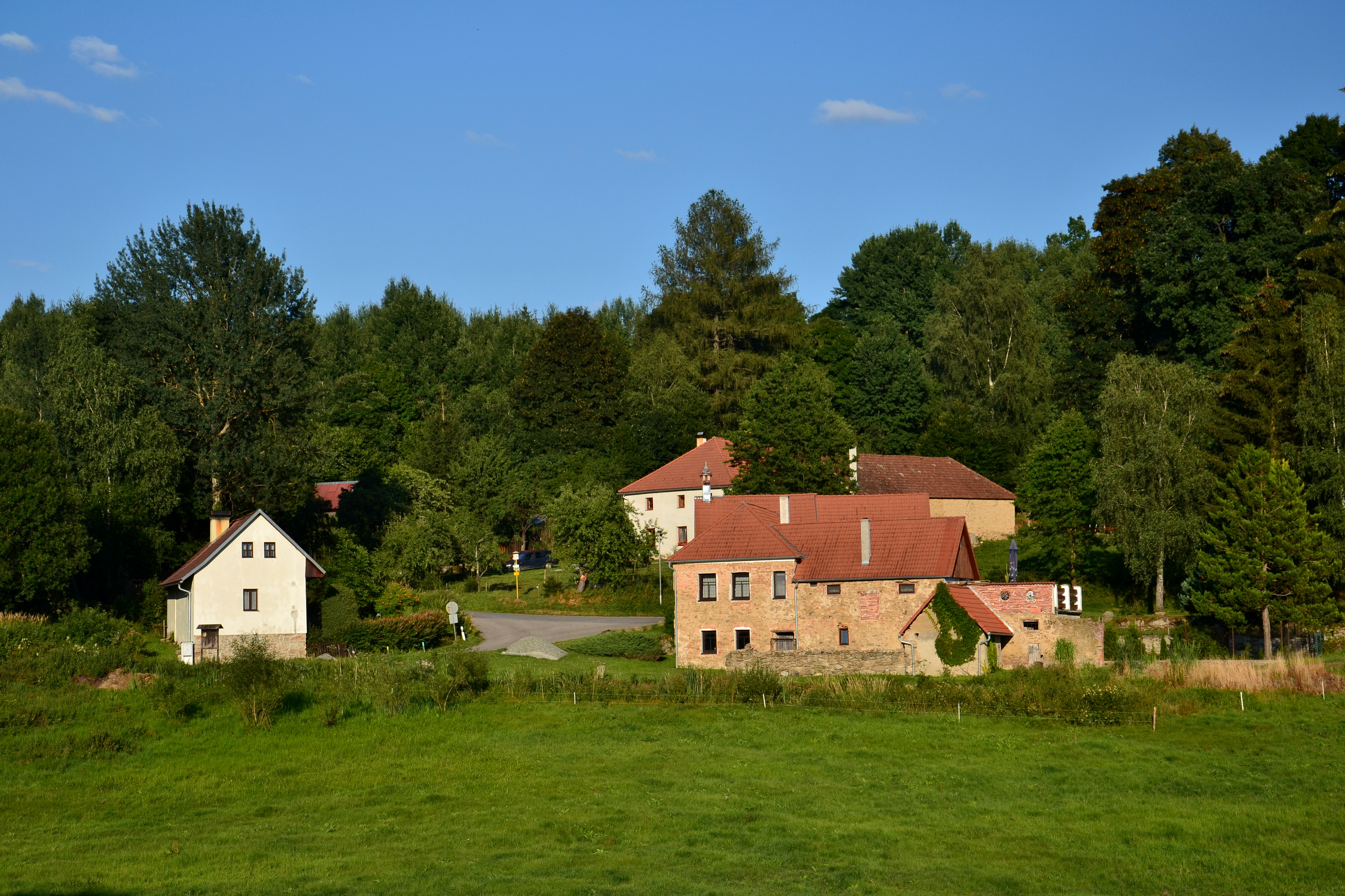 Střed osady (čp. 5, 10 a 20)